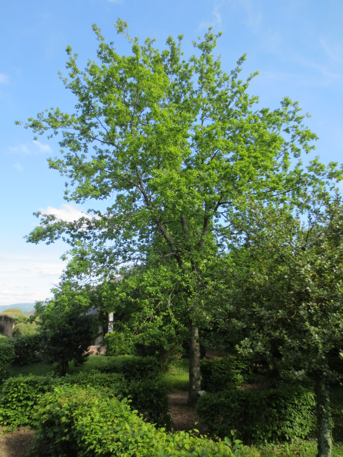 Musée du Septennat de François Mitterrand. Chêne offert au président Mitterrand pour son anniversaire du 26 octobre 1984 par la Reine d’Angleterre Elisabeth II et planté dans le jardin du musée par le président le 2 novembre 1984